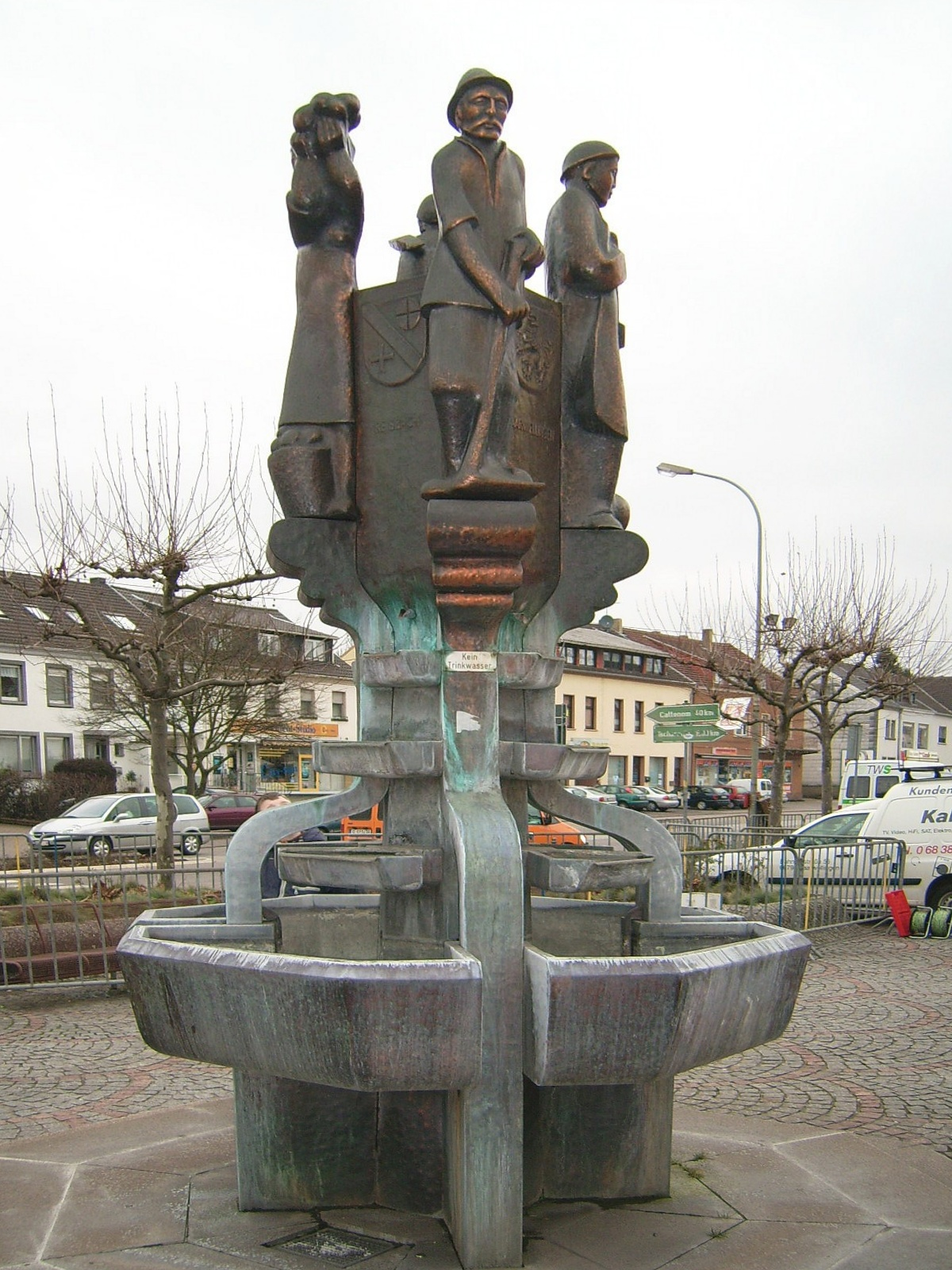 Brunnen Markplatz Saarwellingen